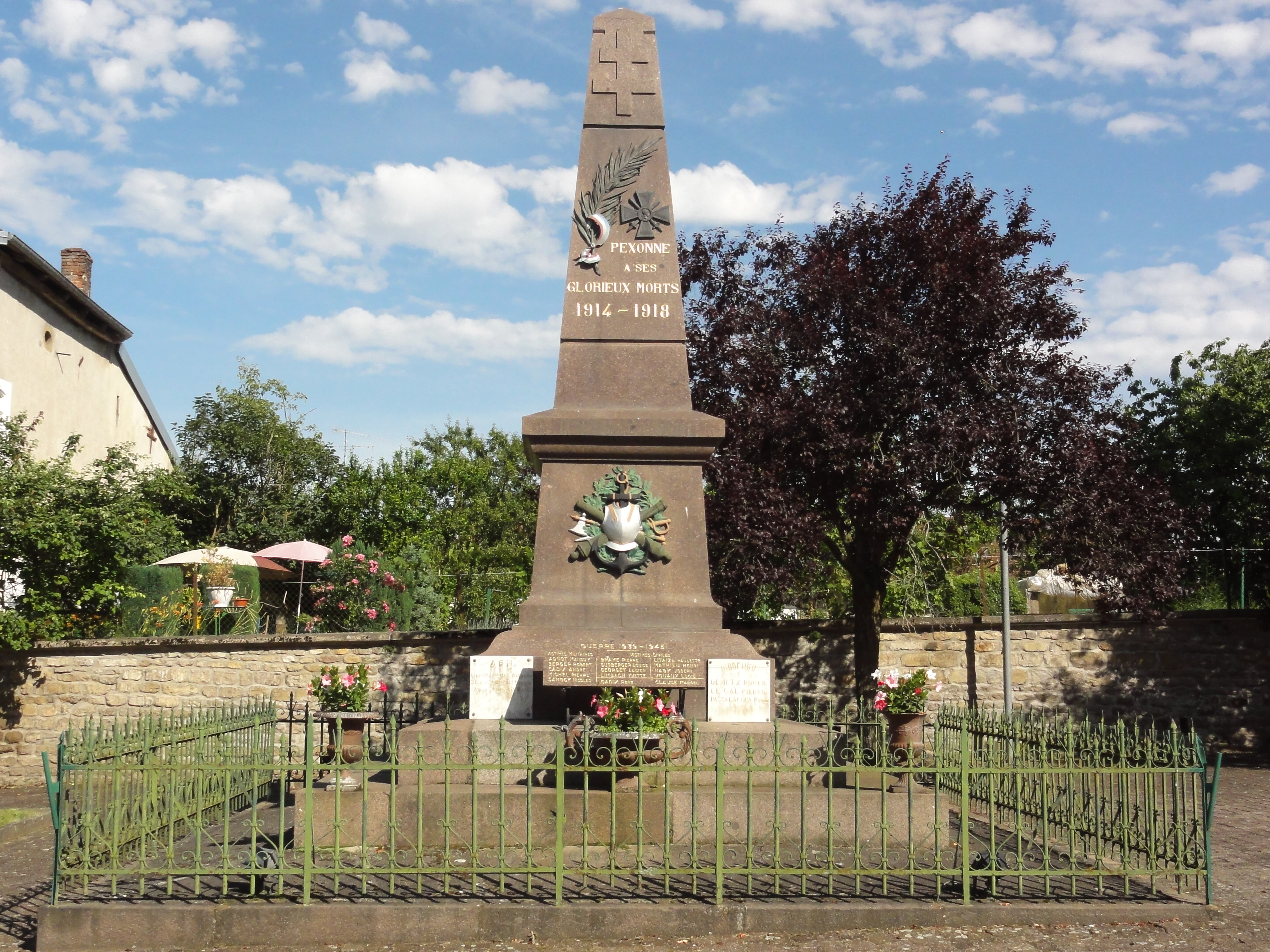 Pexonne (M-et-M) monument aux morts